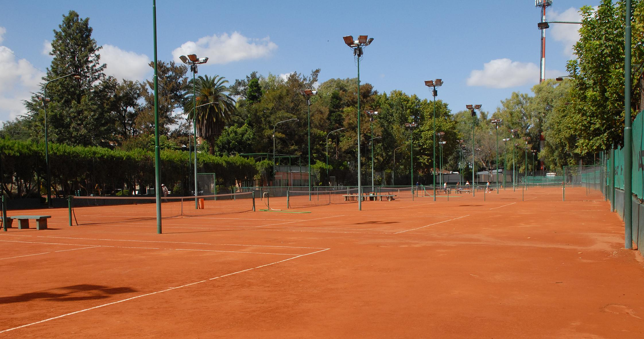 Tenis 2.